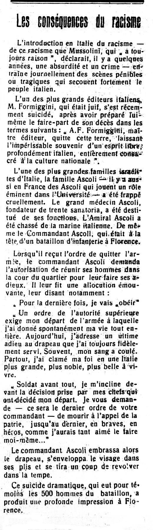 Volonté. L'hebdomadaire ["ou" Tri-hebdomadaire] économique et politique de Madagascar Tamatave 27 mai 1939.